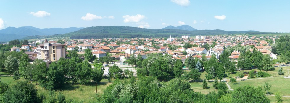 Изглед към Павел баня от изток